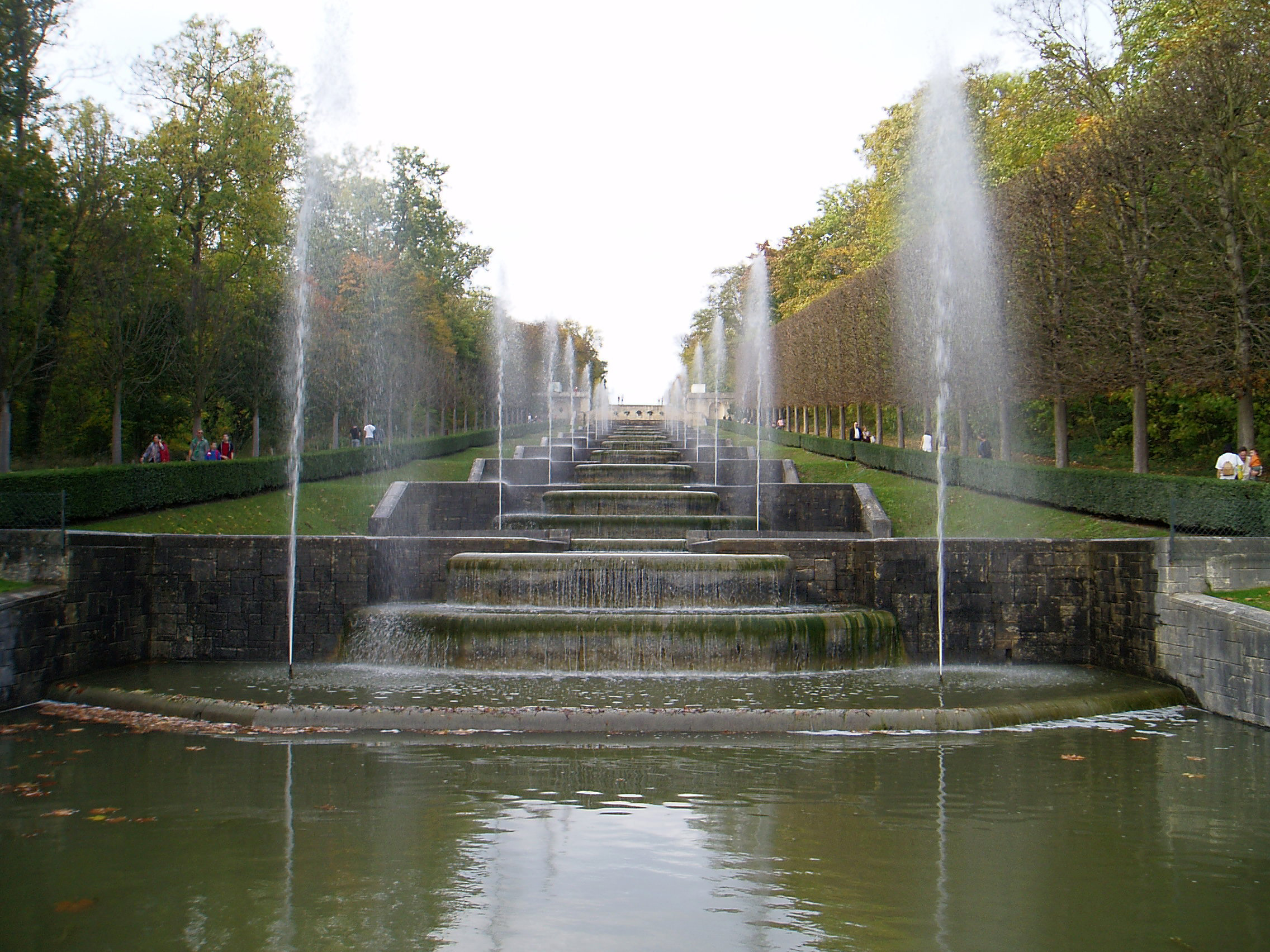 Cascade de l'allée Est, menant au Canal